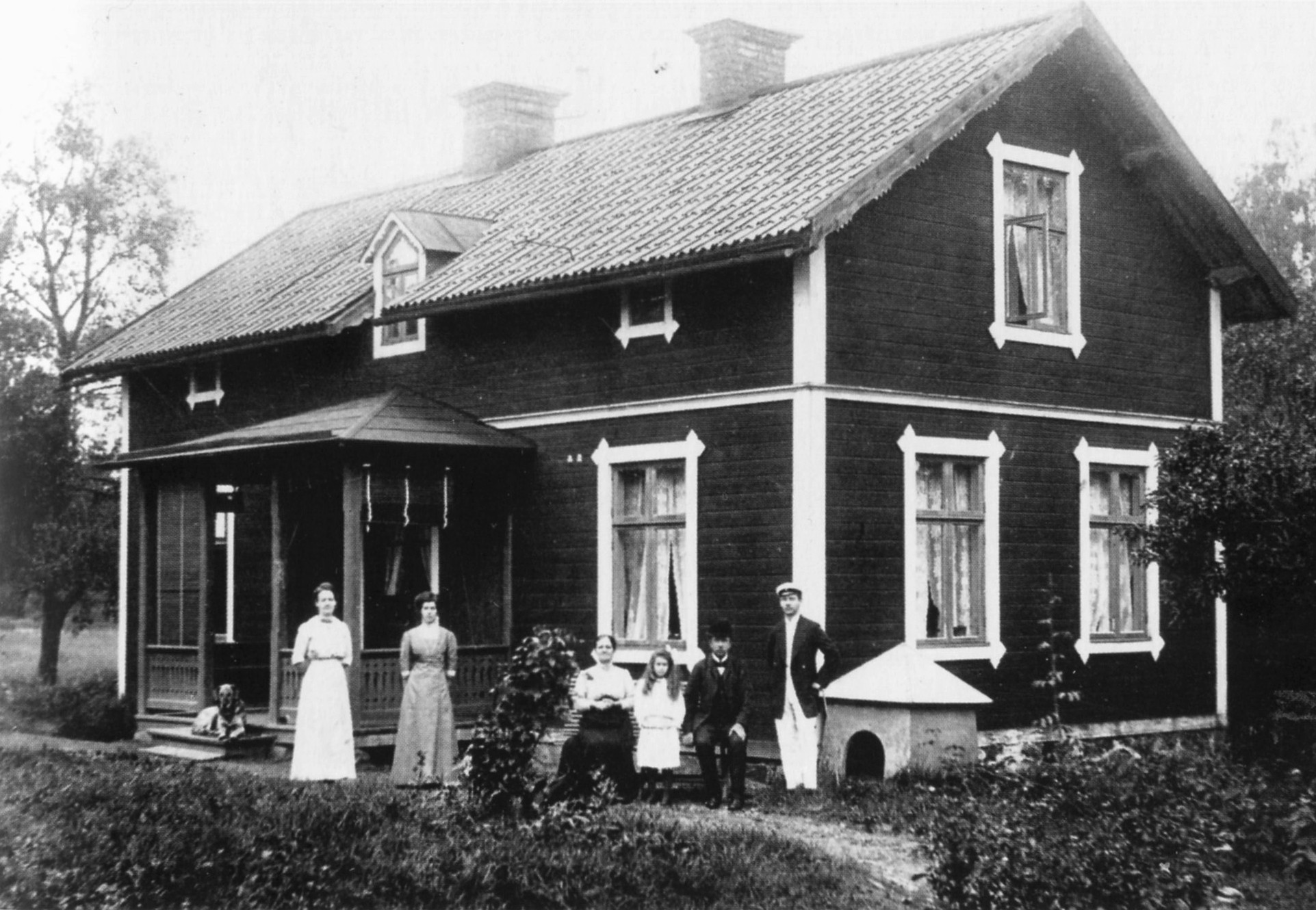 Lisebergs gård från söder